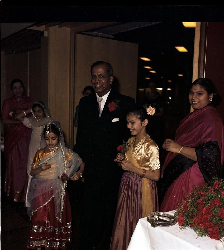 Empfang der indischen Botschaft in der Beethovenhalle